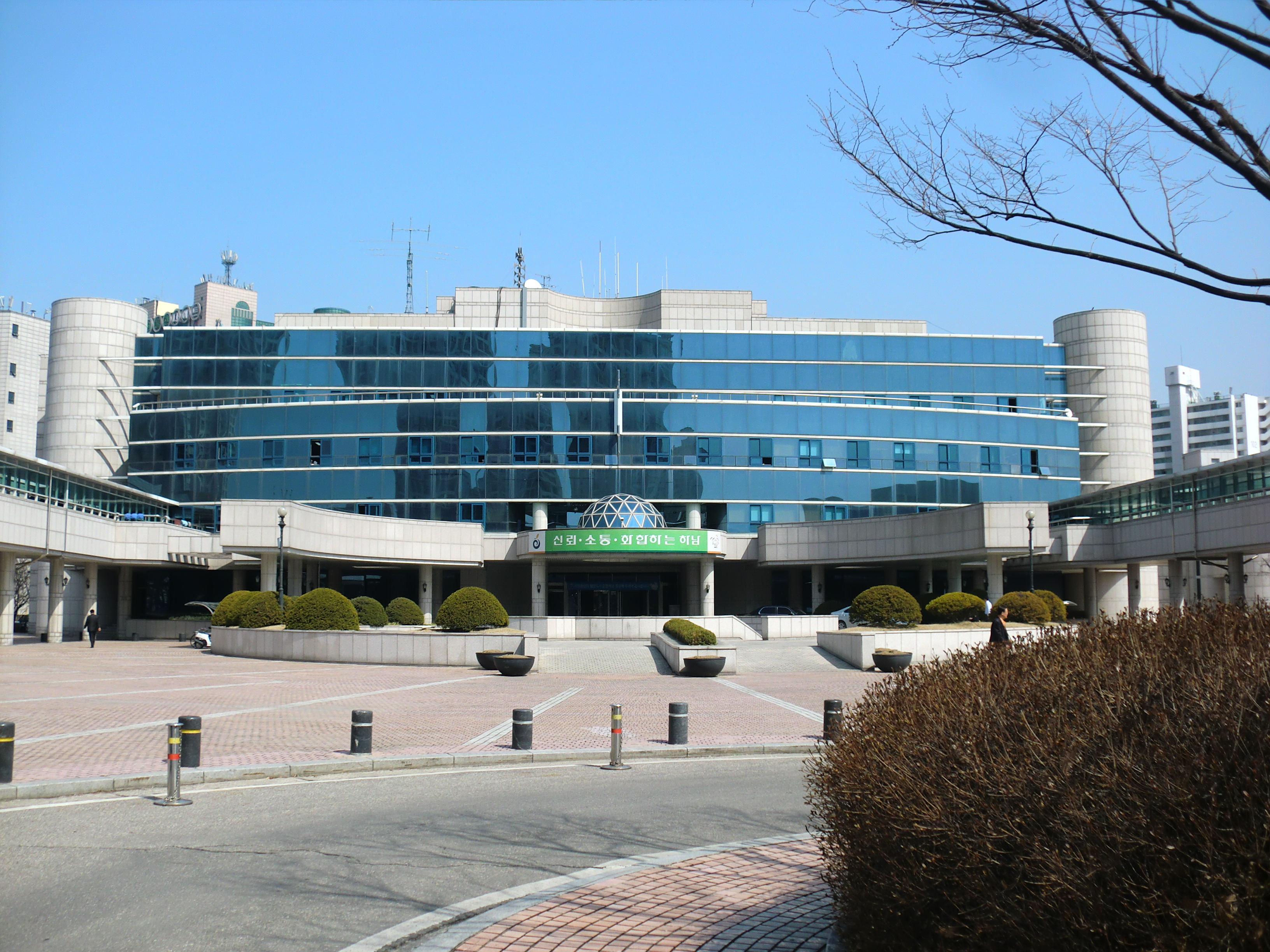 경기도 하남시에 있는 하남시청